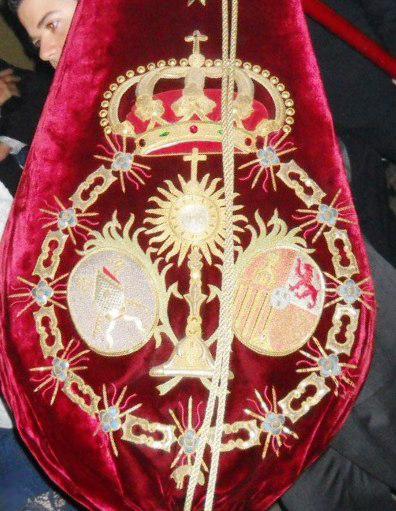 Escudo que aparece en el bacalao de la Hermandad